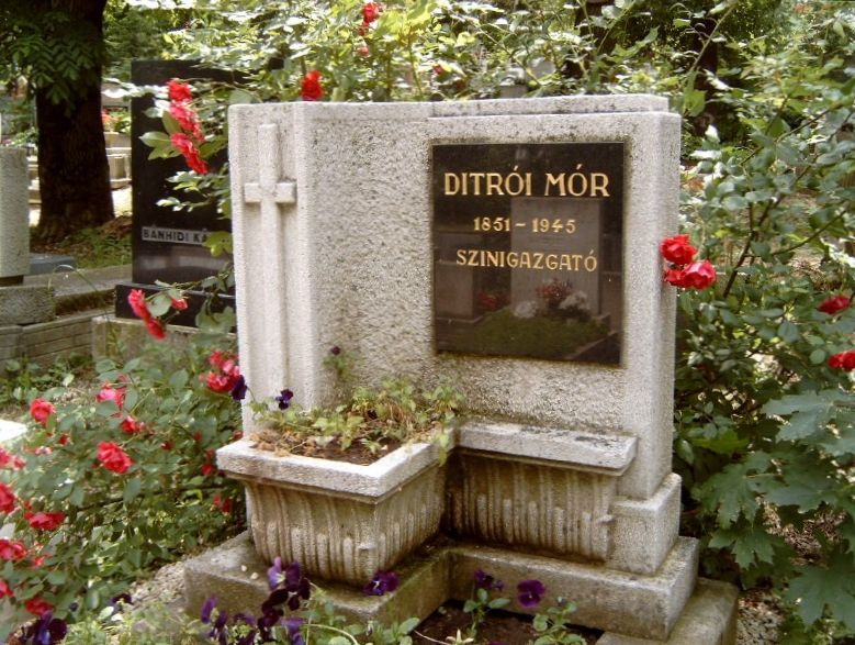 Ditrói Mór (ered.: Himmelstein) (Kolozsvár, 1851. október 5. – Budapest, 1945. február 16.) drámai színész és színigazgató, a Vígszínház alapító igazgatójának sírja Budapesten. Farkasréti temető: 19/1-1-171